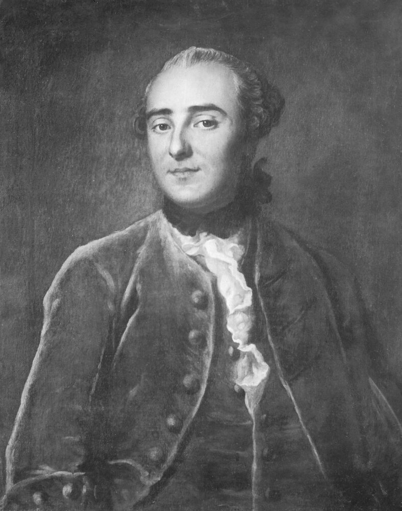 Gustaf Mauritz Posse avporträtterad av Carl Fredrich Brander